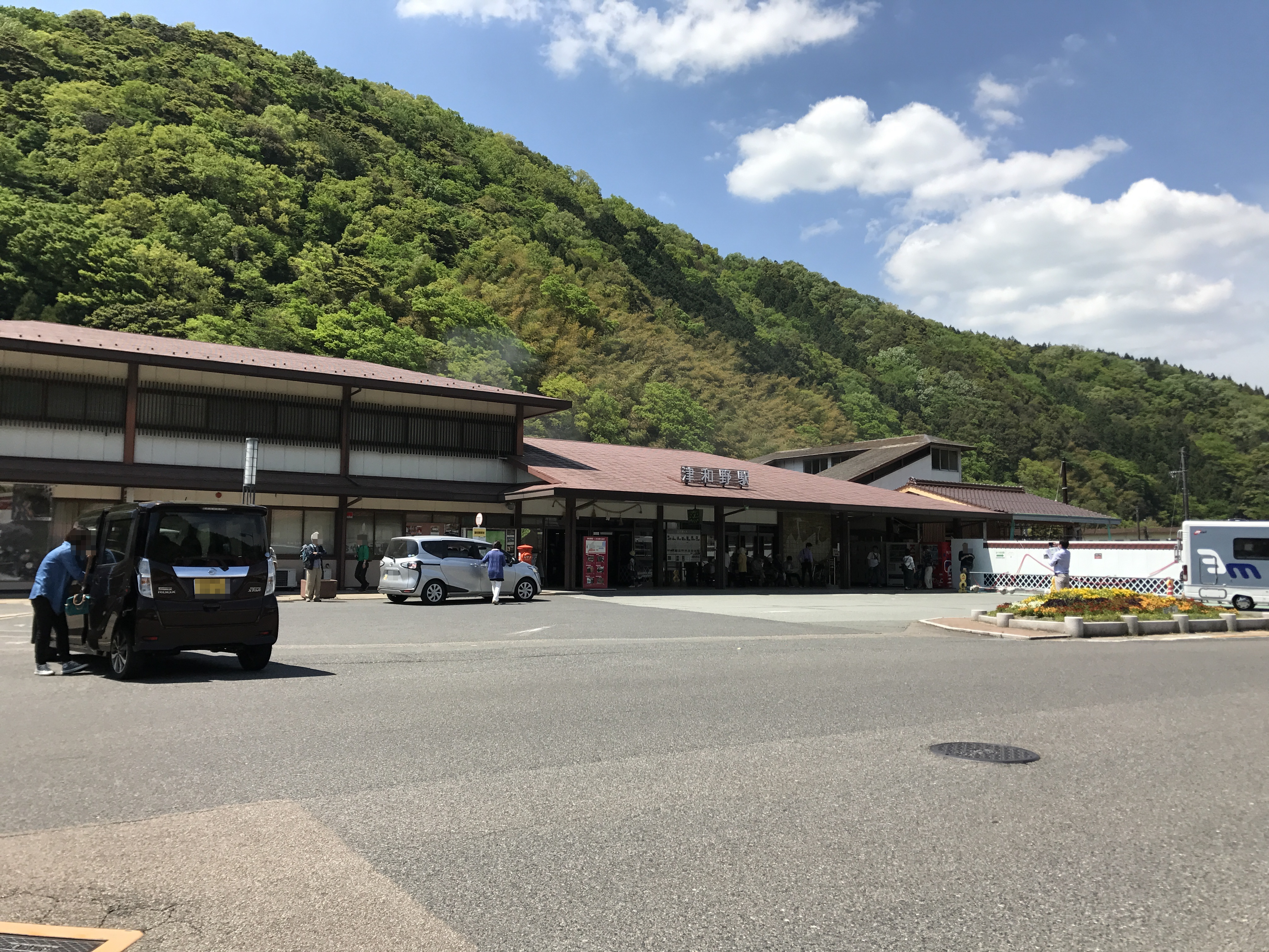 津和野駅駅舎